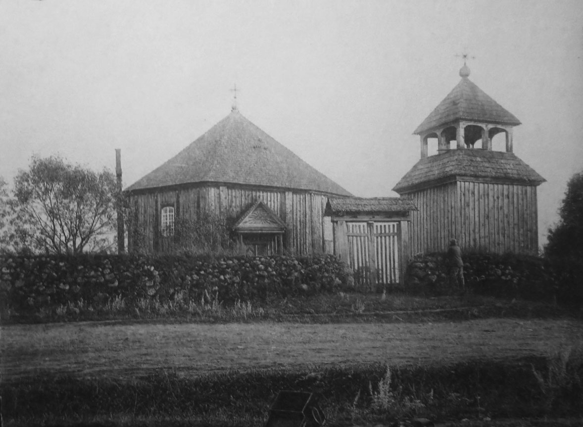 Беларуская (тарашкевіца): Дварэц (Dvarec). Стары касьцёл